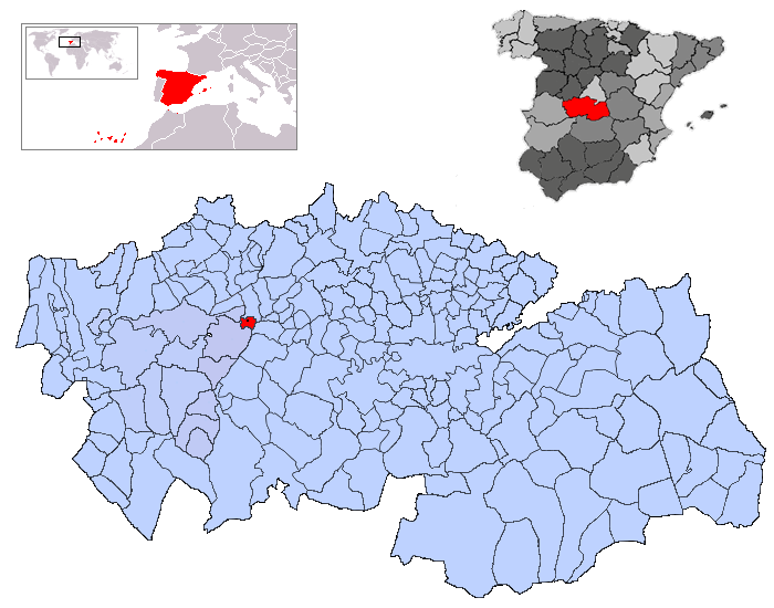 Montearagón en la provincia de Toledo